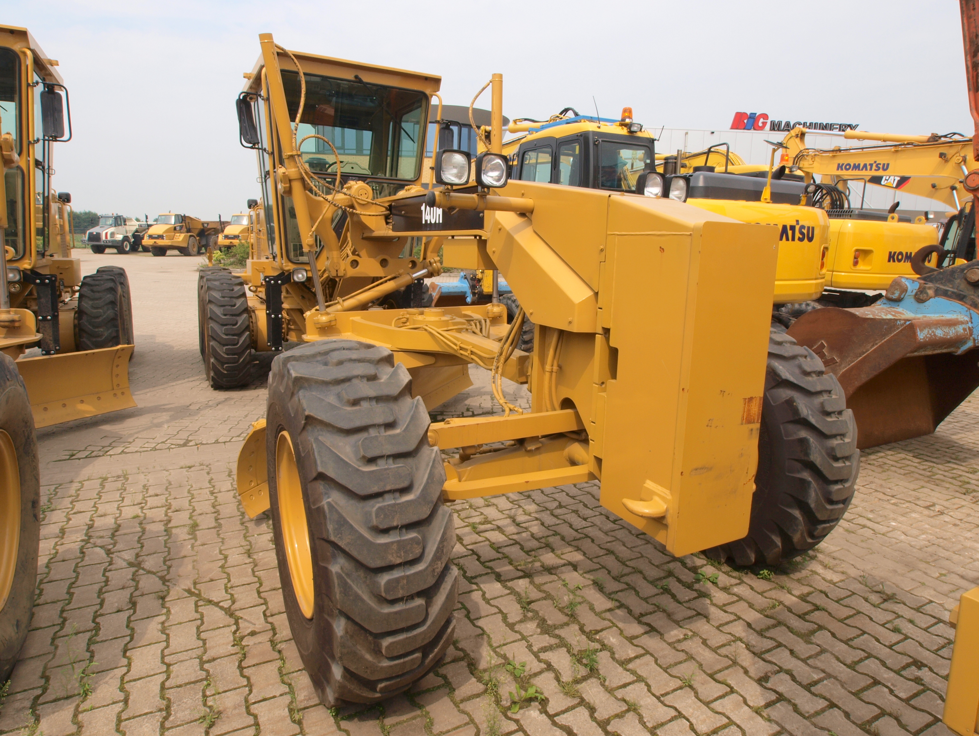 Caterpillar VHP-185 140H